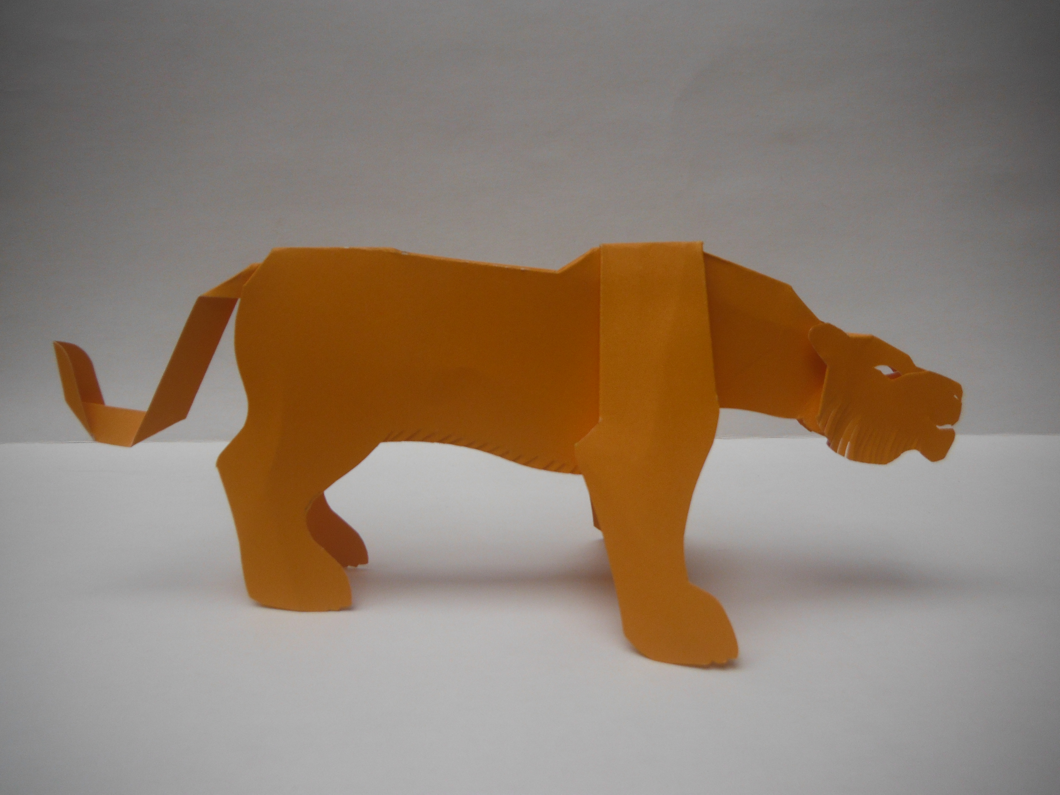 Figura de "Kirigami móvil", hombro, patas delanteras, cuello y cabeza articulados.